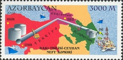 Markanın üzərində Bakı-Ceyhan neft kəmərinin sxemi təsvir olunmuşdur.